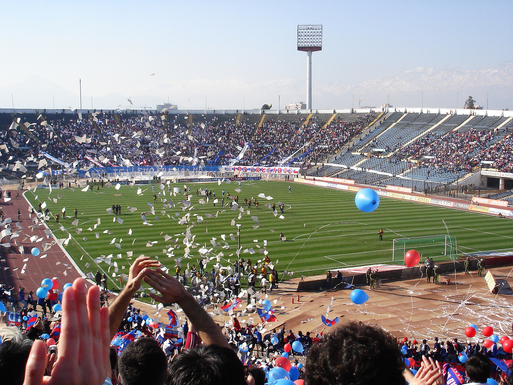 Universidad de Chile team going to the field in the Clásico Universitario at the National Stadium of Chile